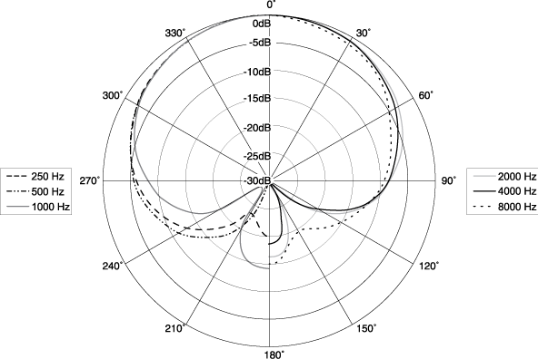 Frekvenciafüggés